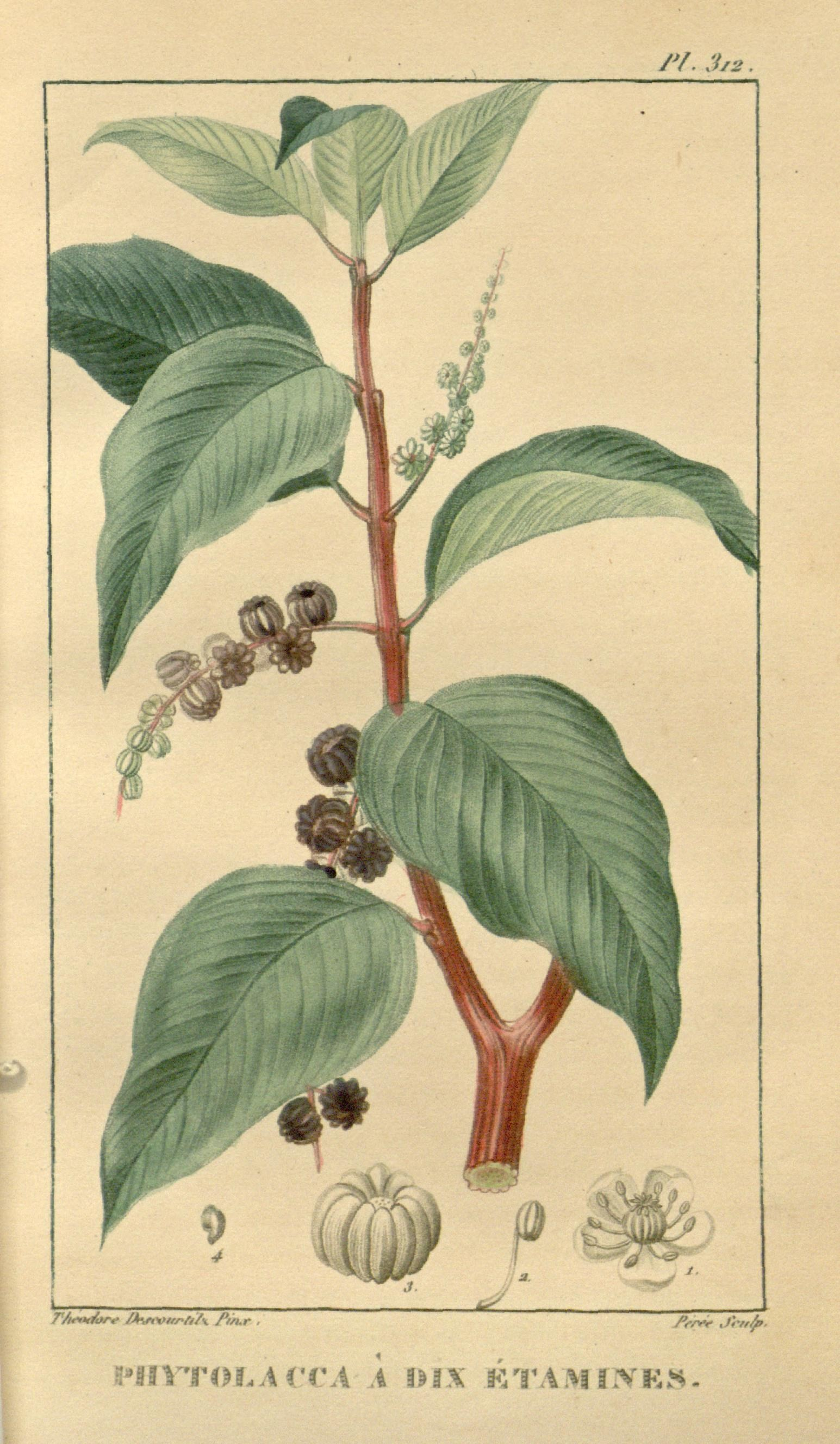 /'/. 3*2 . n*iiYTOLAVVA .4 DIX KTAMI.VKî*.